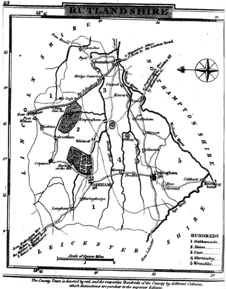 Rutland